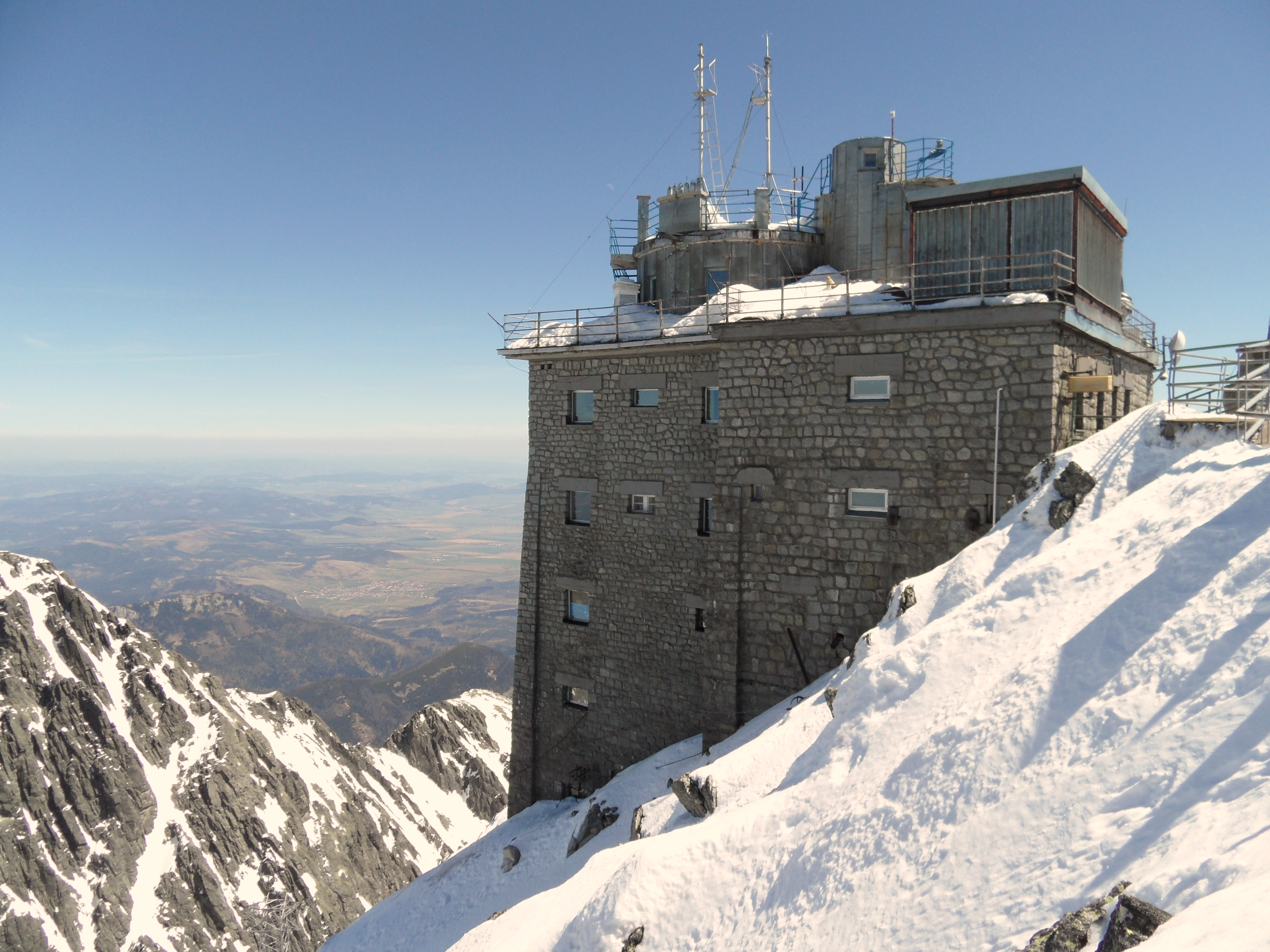 Observatórium Lomnický štít